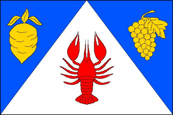 Vlajka obce Řepiště